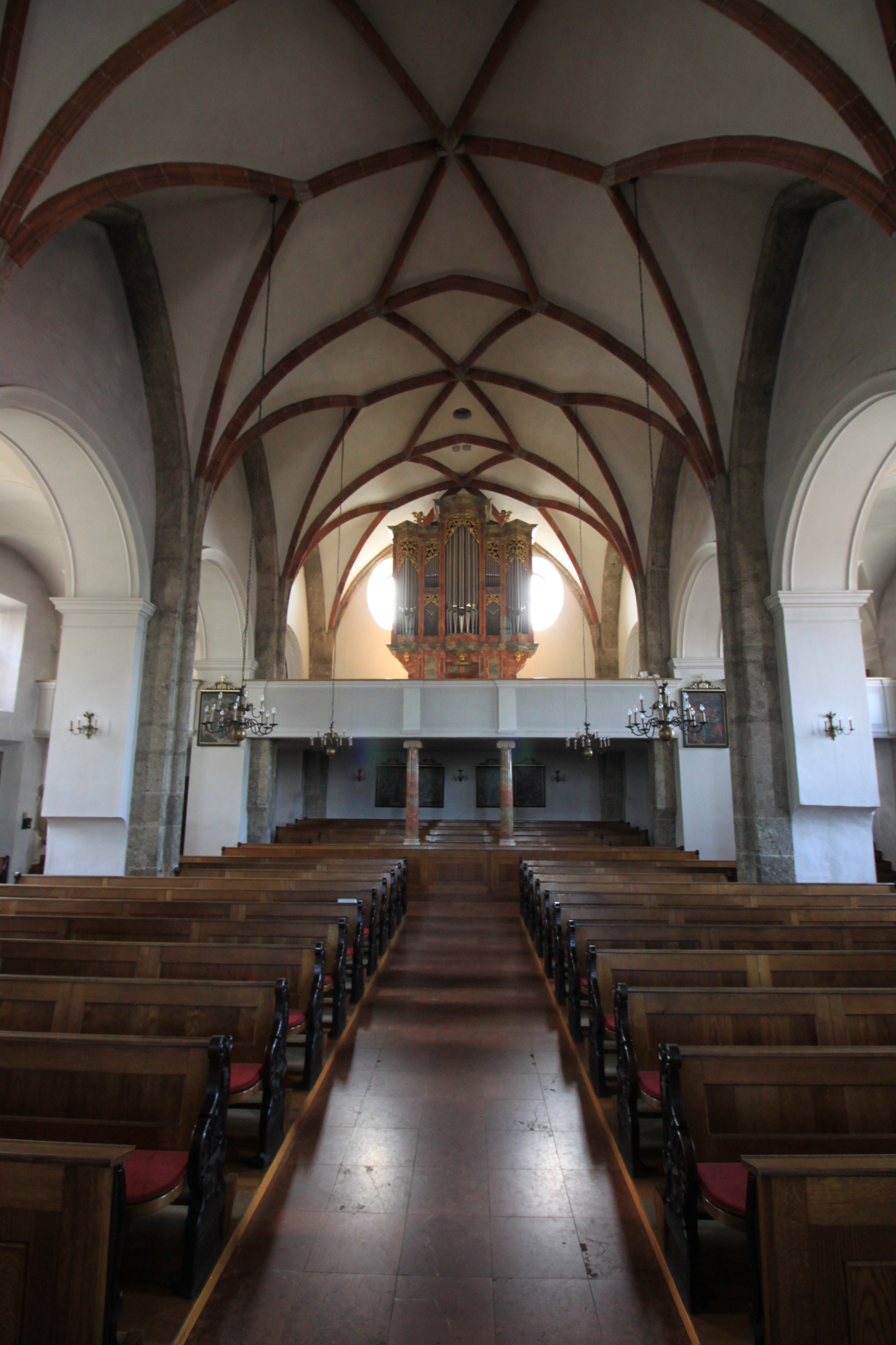 Kath. Pfarrkirche hl. Martin in Straßwalchen, zur Orgelempore und Orgel